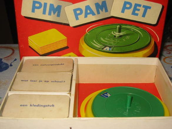 Pim-pam-pet spel